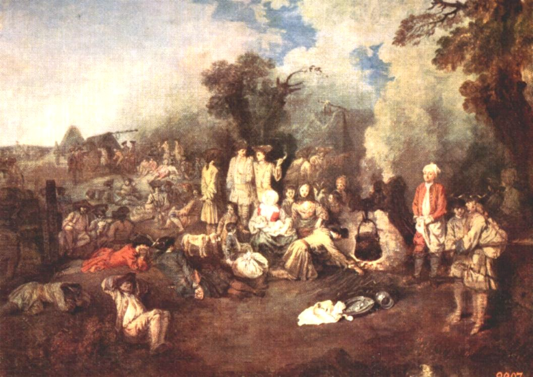 Antoine Watteau, Biwak - Camp volant; Öl auf Leinwand, Staatliches Puschkinmuseum in Moskau Maler: Antoine Watteau andere Versionen: :Image:Antoine_Watteau_004.jpg (auf Commons) Der Maler ist seit über siebzig Jahren tot, daher besteht kein Urheberrechtsschutz mehr.